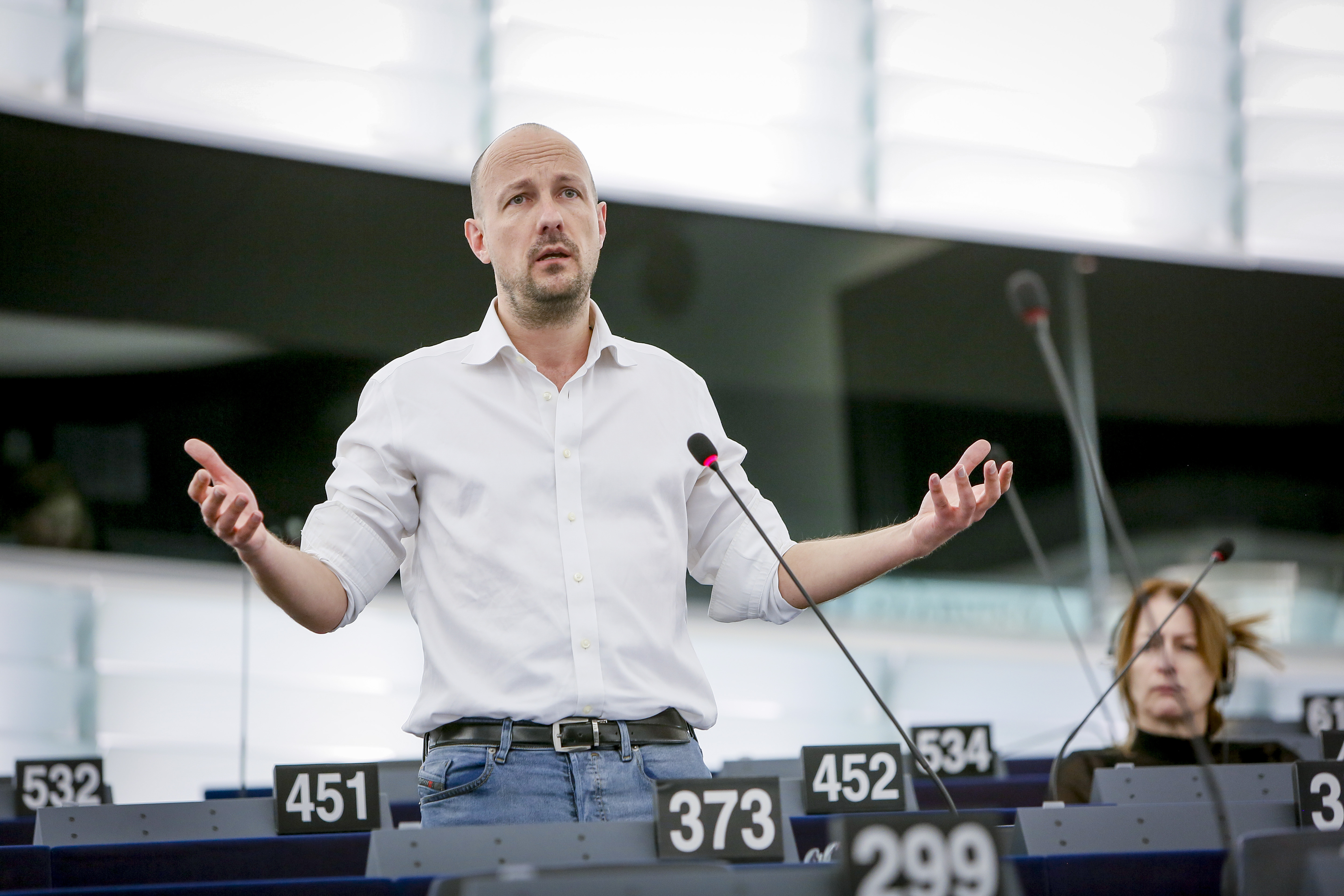 Hands voting - shade